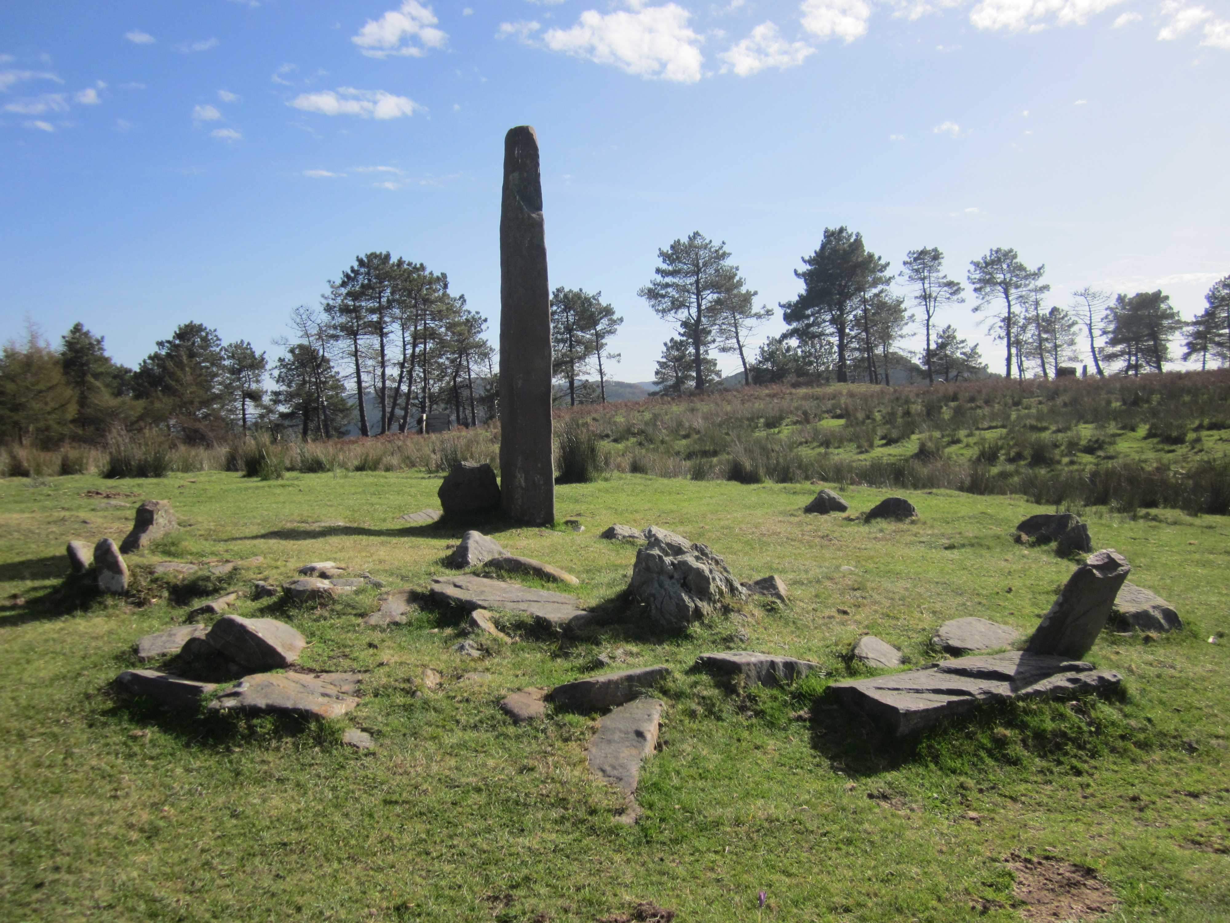 Ensemble de Eteneta.